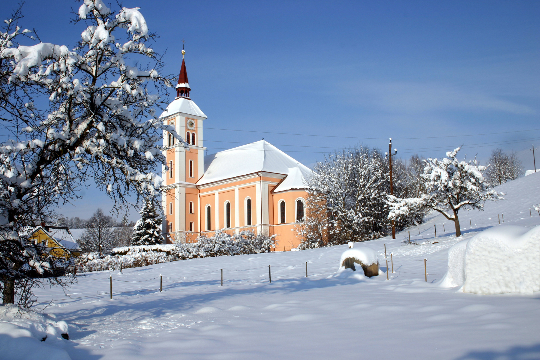 Jede Jahreszeit reizvoll!